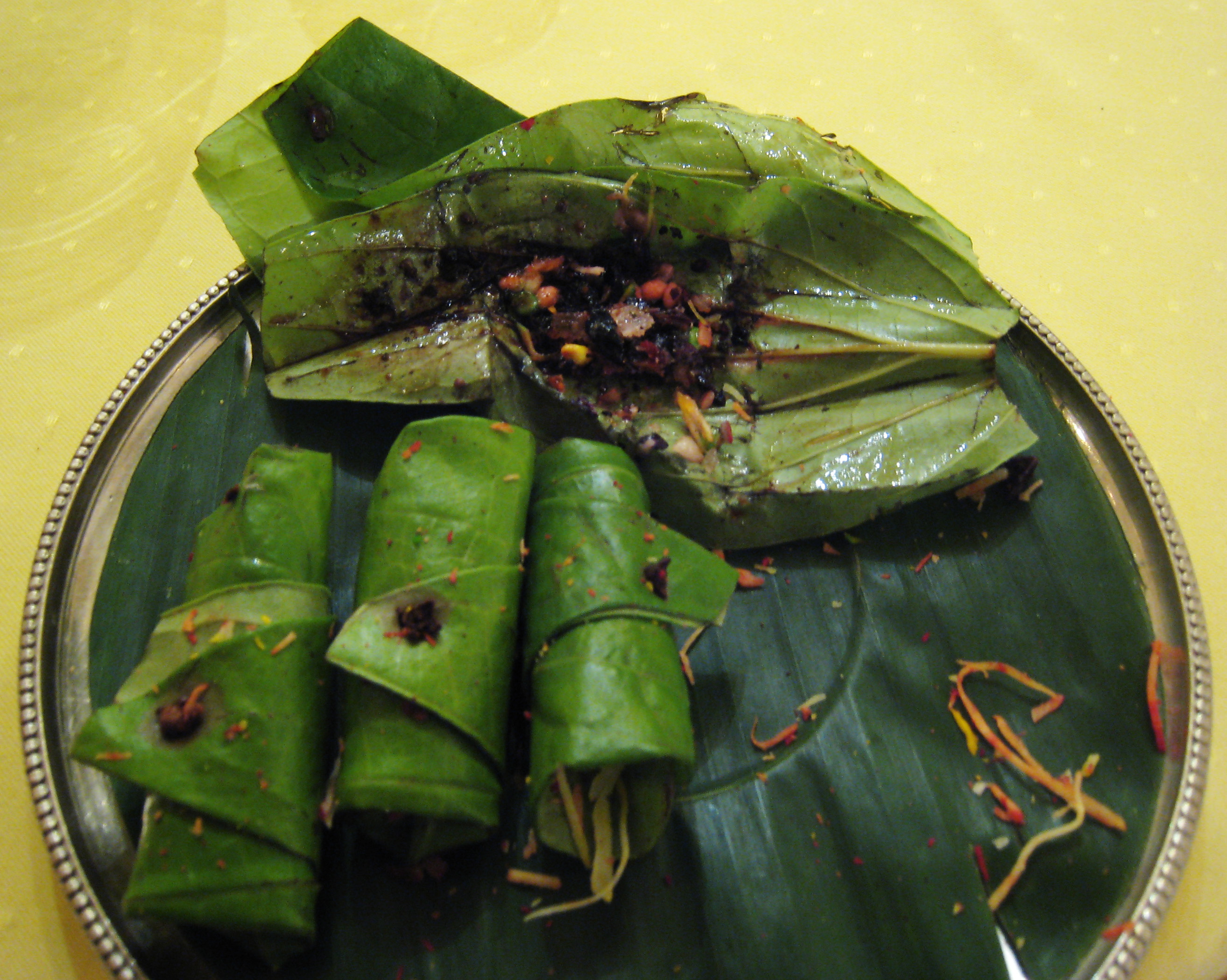 dakshin paan